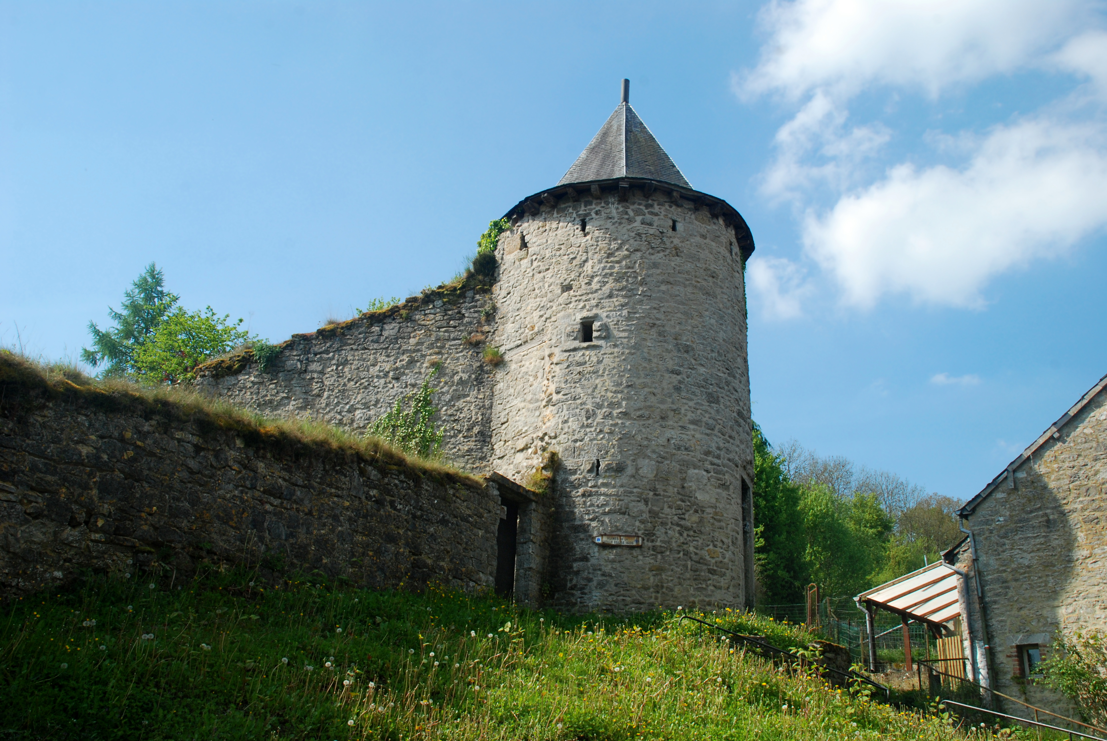 Belgique - Province de Namur - Viroinval - Nismes - Château du Pont d'Avignon